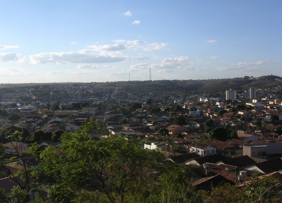 Vista de Catalão, em Goiás (Brasil), a partir do Centro Cultural, no morro das Três Cruzes.